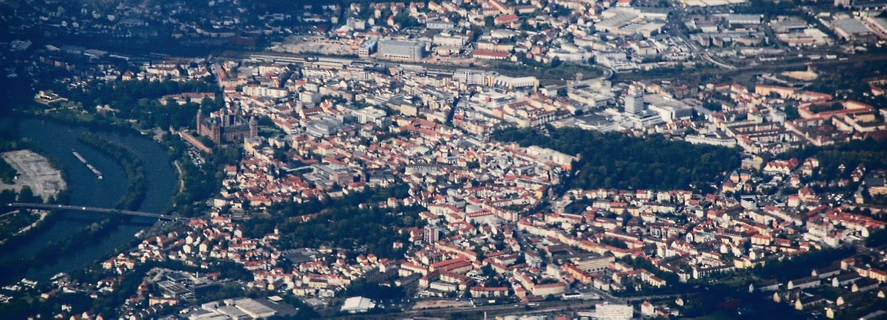 Luftbild der Innenstadt von Aschaffenburg